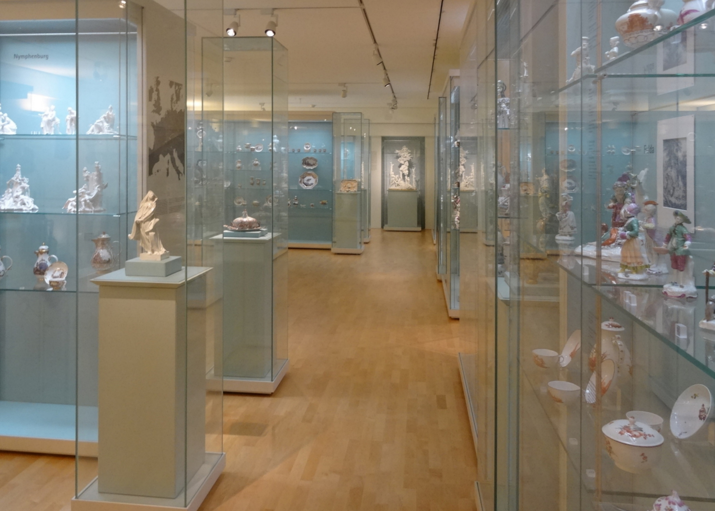 Porzellan- und Fayence-Sammlung im "Hartog-Flügel" des MKG Hamburg